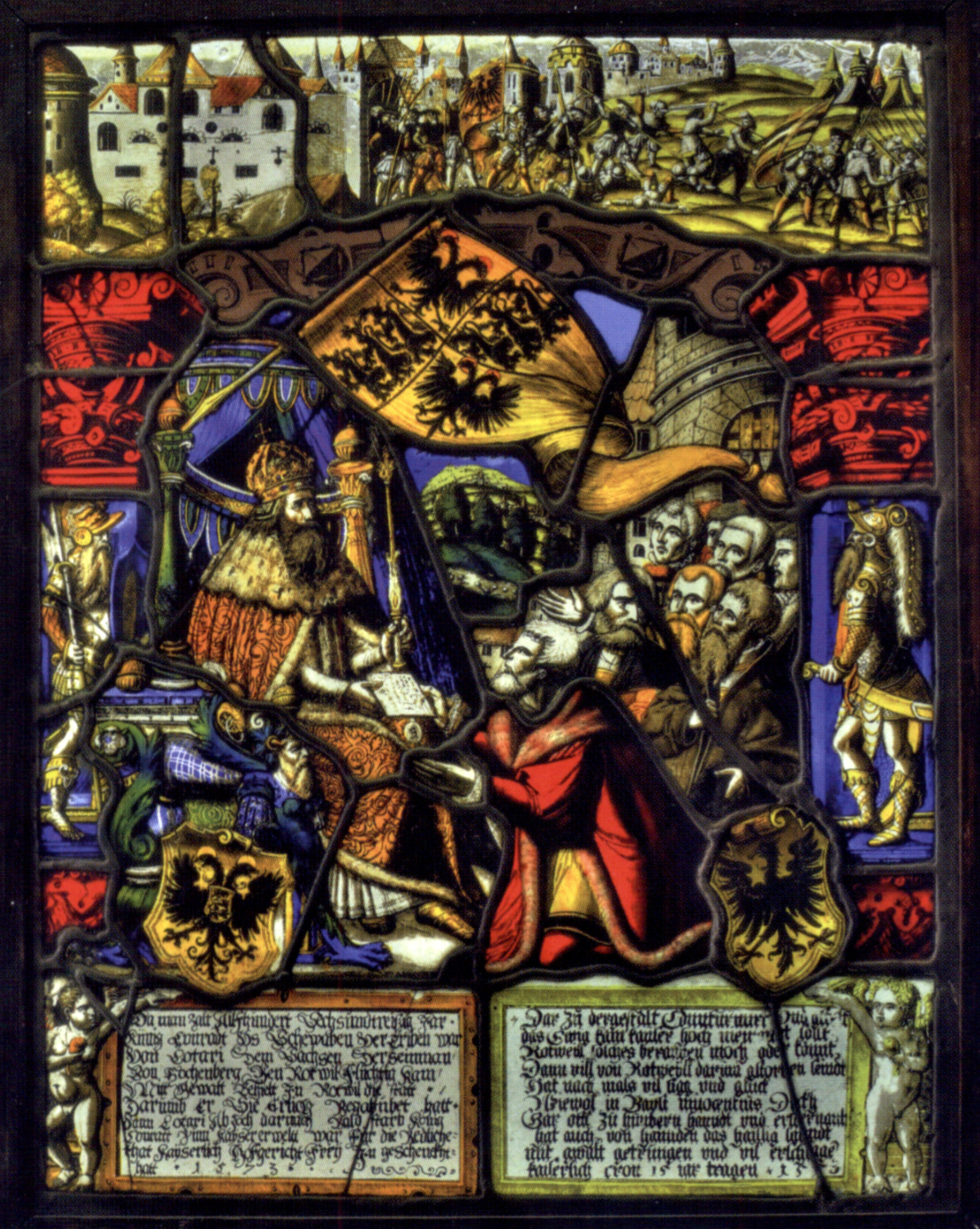 Kabinettscheibe mit dem Motiv "Konrad III. verleiht der Stadt Rottweil das Hofgericht", anonym, 1573, unter Anlehung an einen Holzschnitt von 1525; Stadtmuseum Rottweil